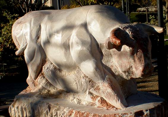 Sculpture en marbre rose de Caunes-Minervois exposée à Caunes-Minervois